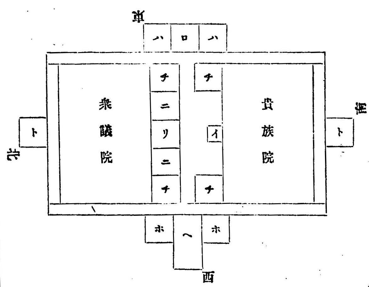 広島臨時仮議事堂 平面図 イ : 玉座、ロ : 便殿、ハ : 侍従室、ニ : 議長室書記官長室、ホ : 議員休憩室、ヘ : 玄関、ト : 傍聴人入口、チ : 中庭、リ : 廊下